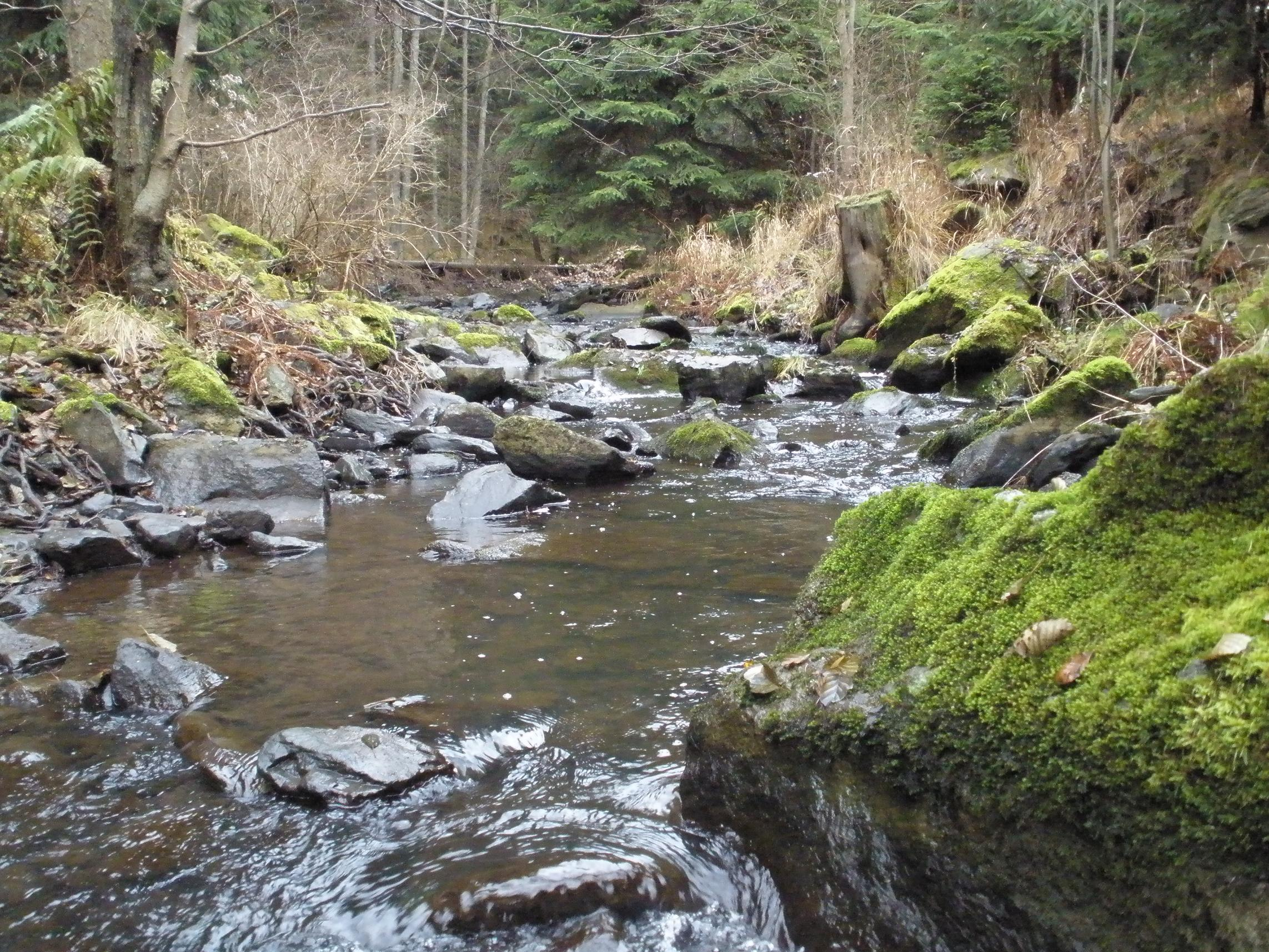 Ratibořský potok nad Polomským mlýnem.